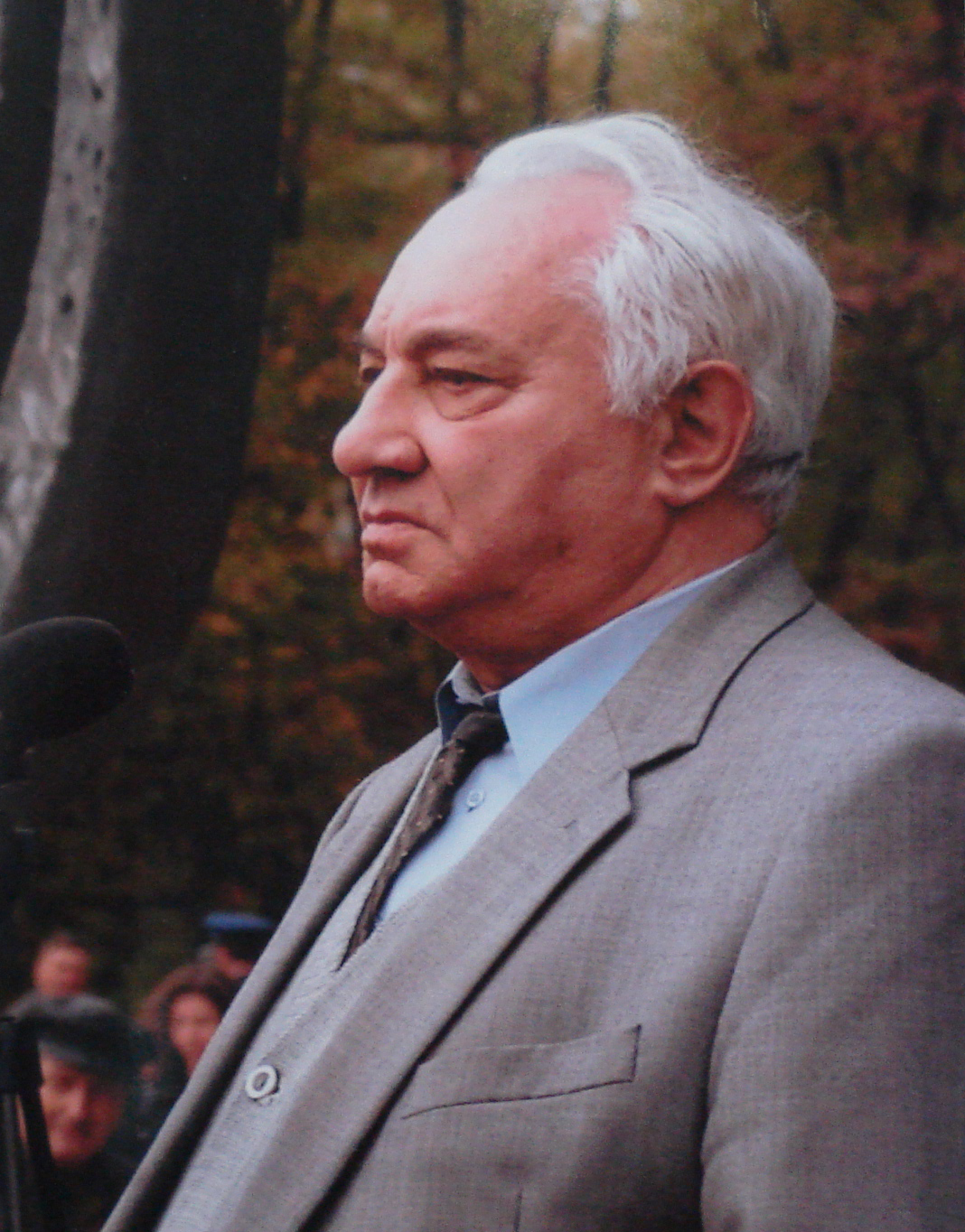 Левитас Илья Михайлович, Киев, 29 сентября 2011 года.